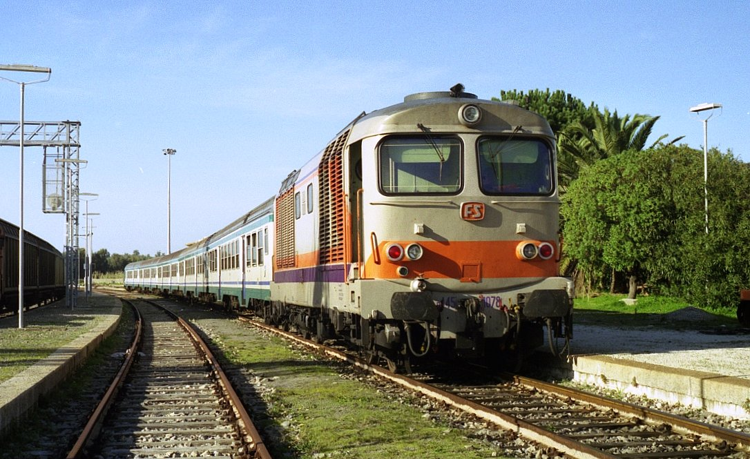 Locomotiva D.445.1078 delle Ferrovie dello Stato in sosta a Carbonia Stato